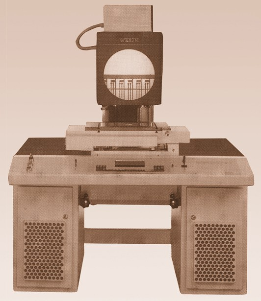 Erster CNC-gesteuerter Messprojektor